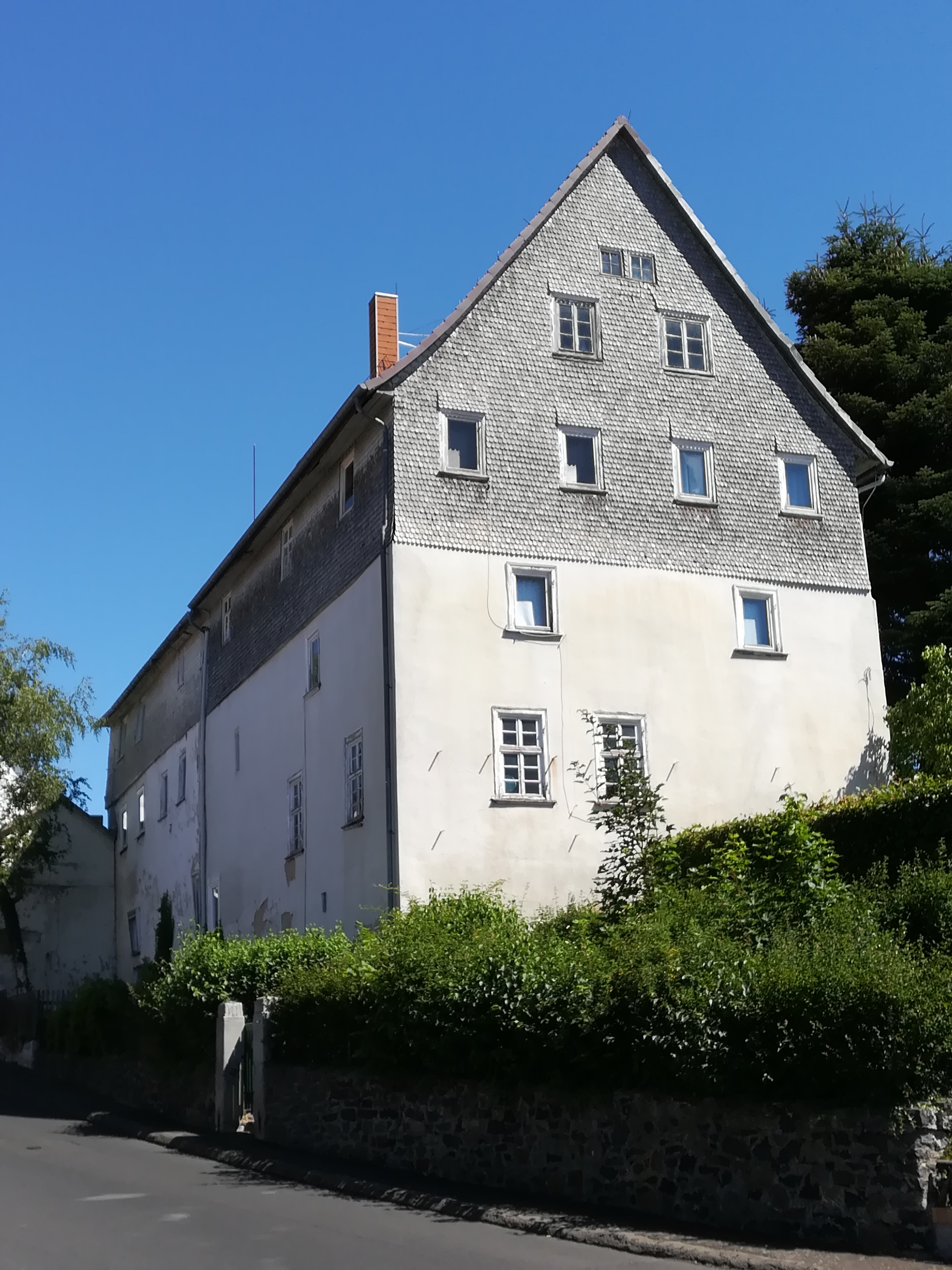 Erhaltener Bau des ehemaligen Georgklosters